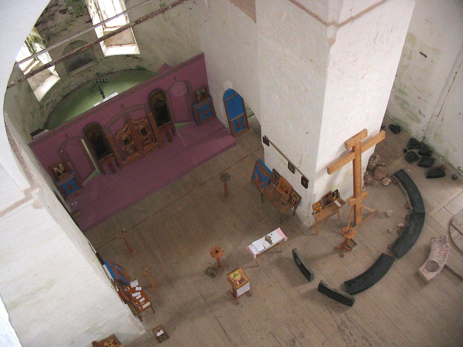 Kiy-island (Кий-остров), White Sea, Russia Onega Monastery of the Cross (Онежский Крестный Монастырь) (1660) July-August 2006